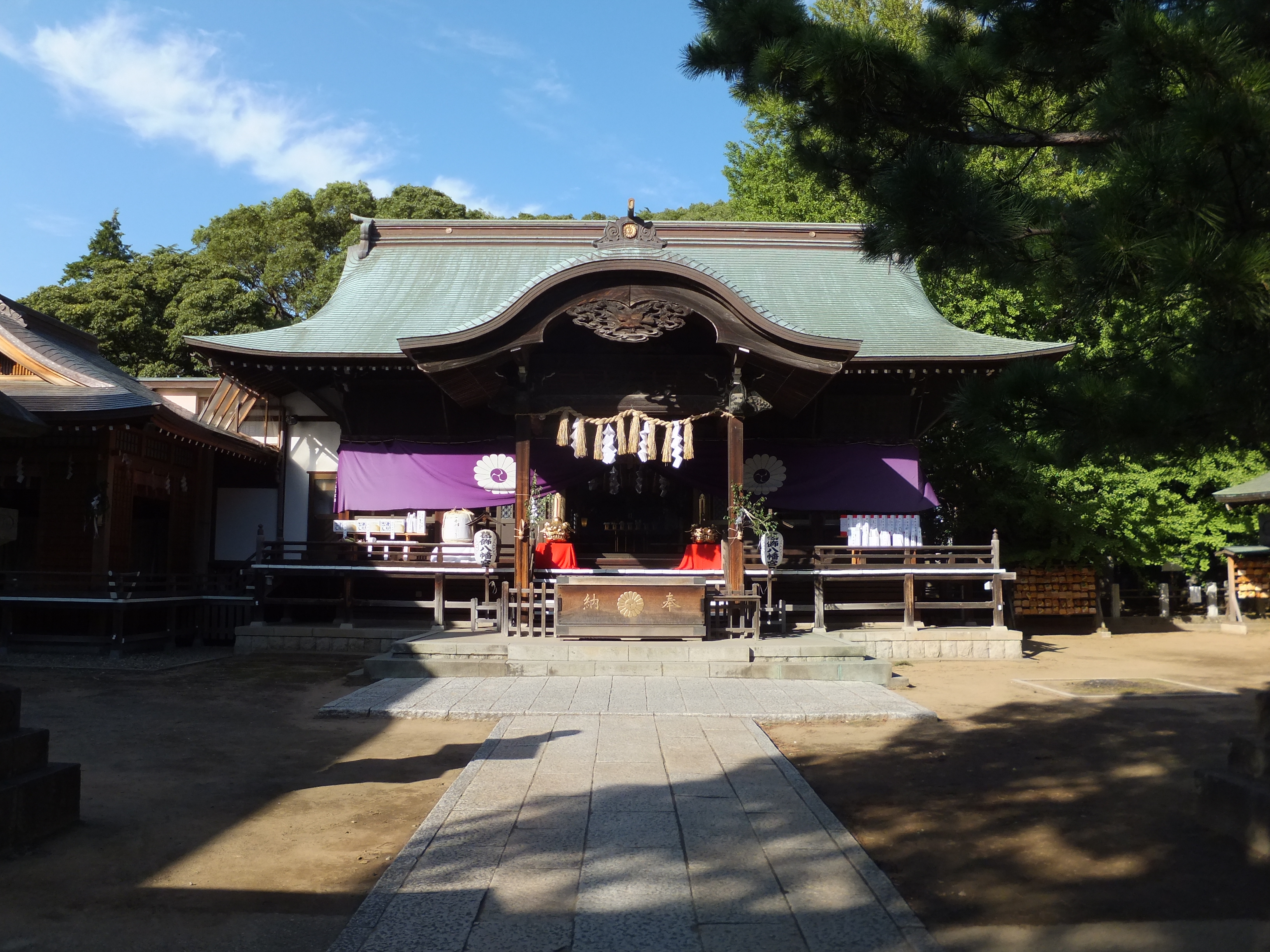 葛飾八幡宮（千葉県市川市）、拝殿